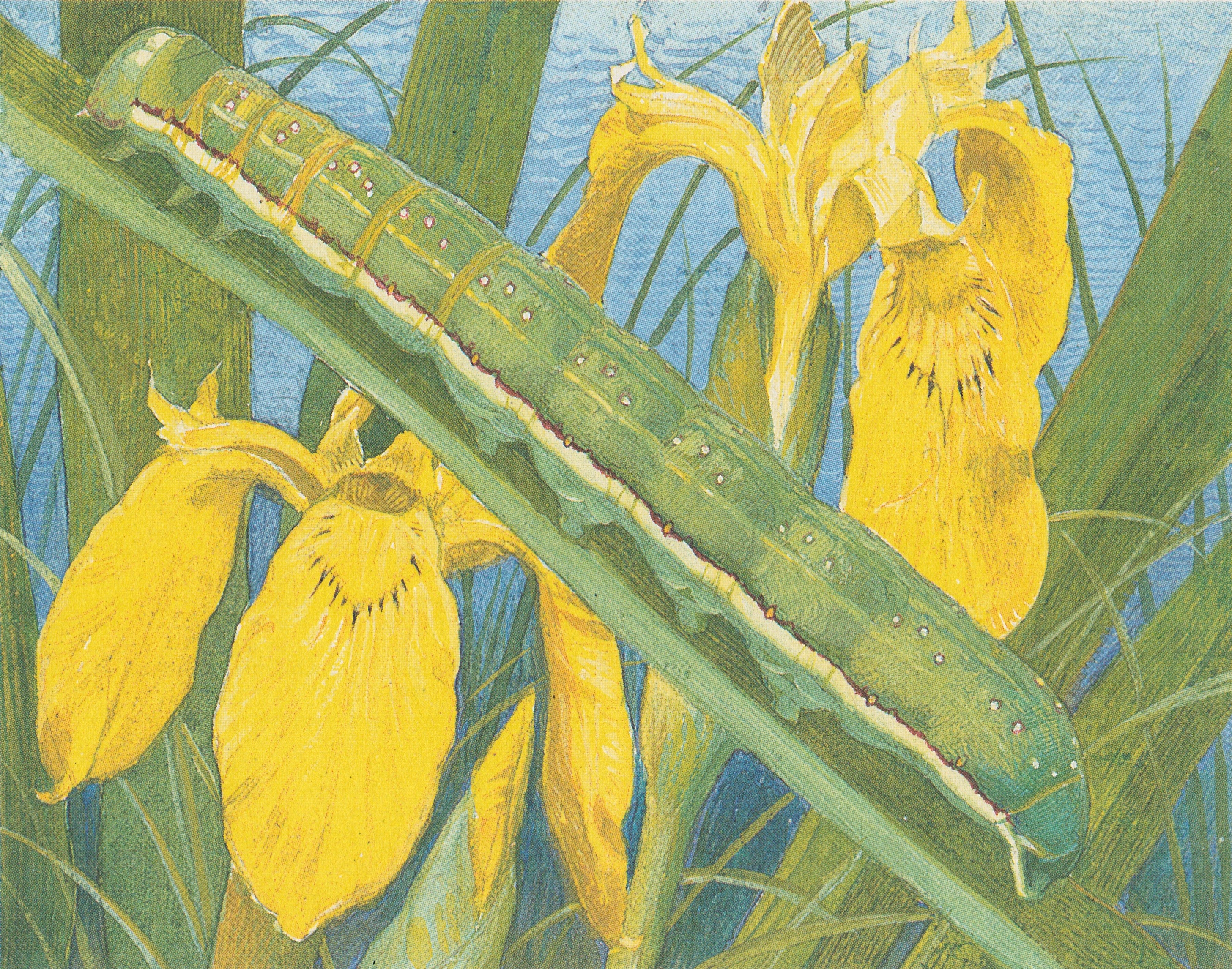 Raupe der Braunen Moderholzeule (Xylena vetusta) auf einer Gelben Schwertlilie (Iris pseudacorus)